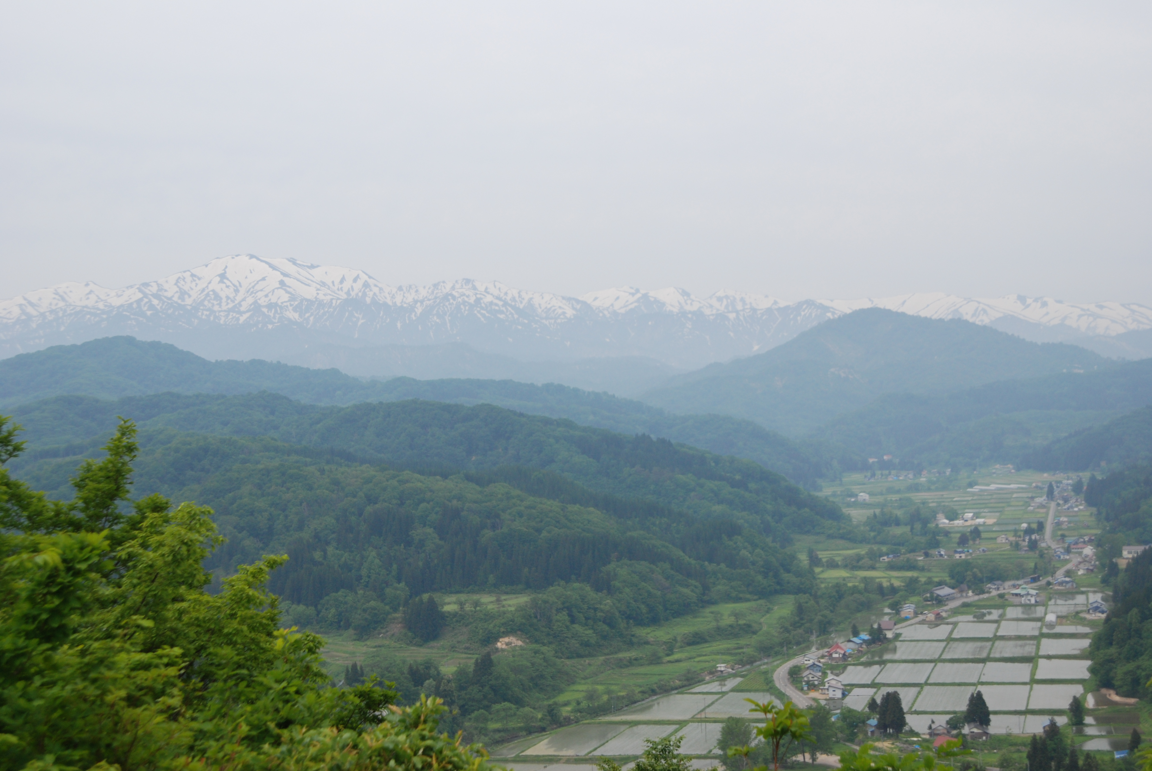 中津川地区の景観